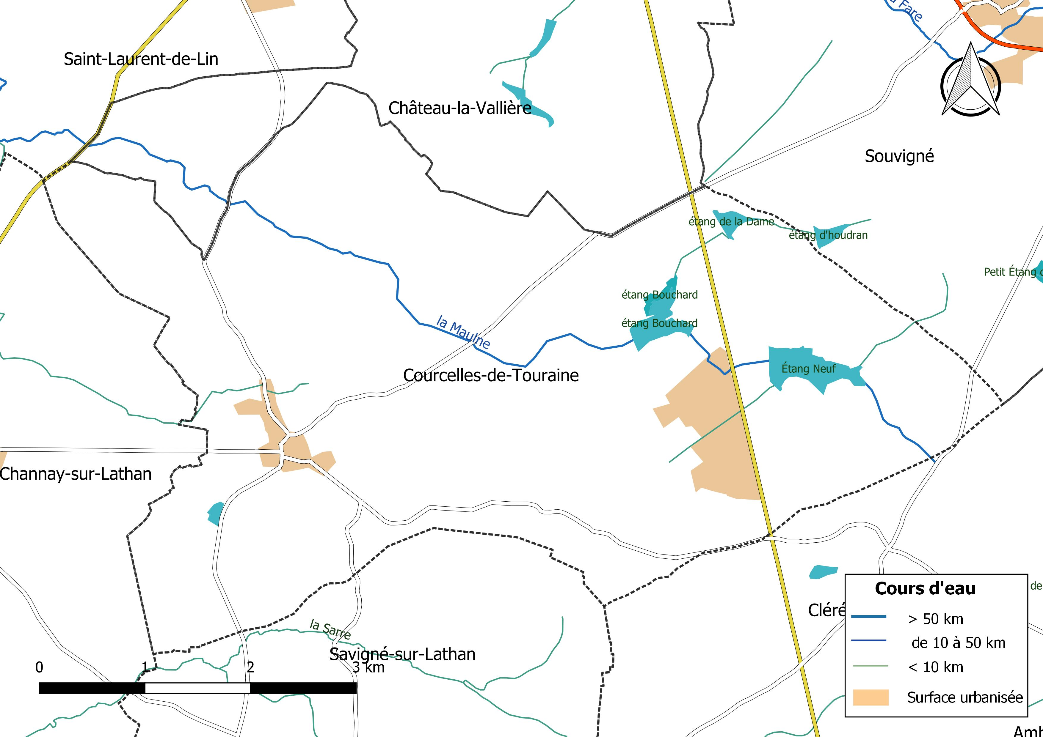 Carte du réseau hydrographique de la commune de Courcelles-de-Touraine (France).